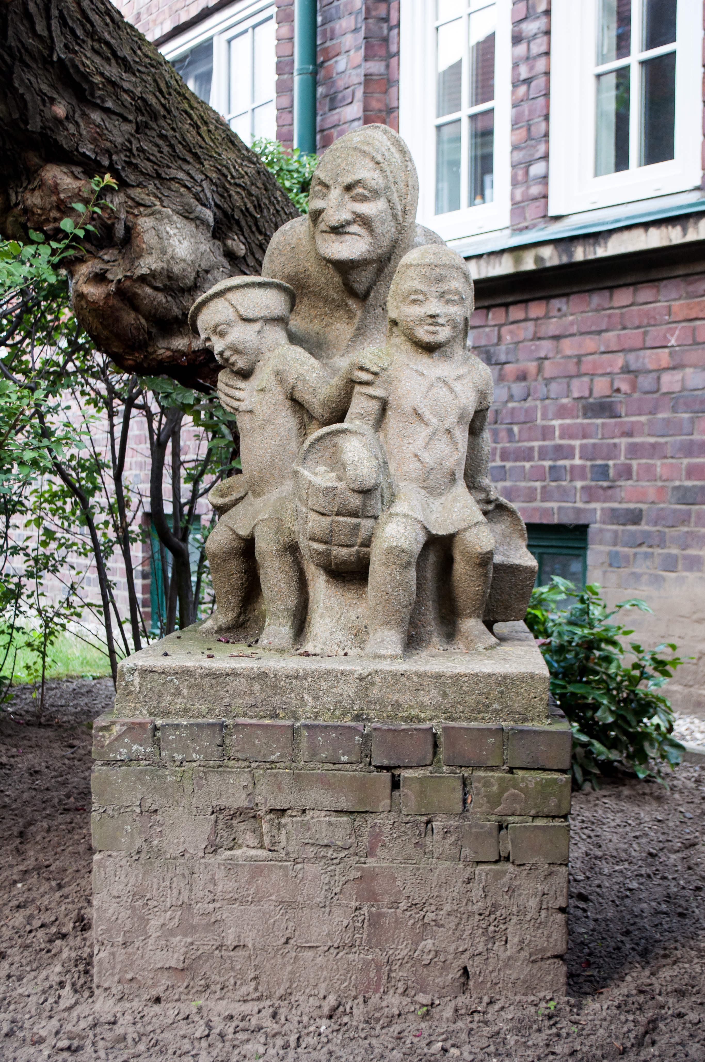 Plastik Hänsel und Gretel von Richard Kuöhl vor dem Siedlungsbau Fiefstücken 12 in Hamburg-Winterhude. This is a photograph of an architectural monument.